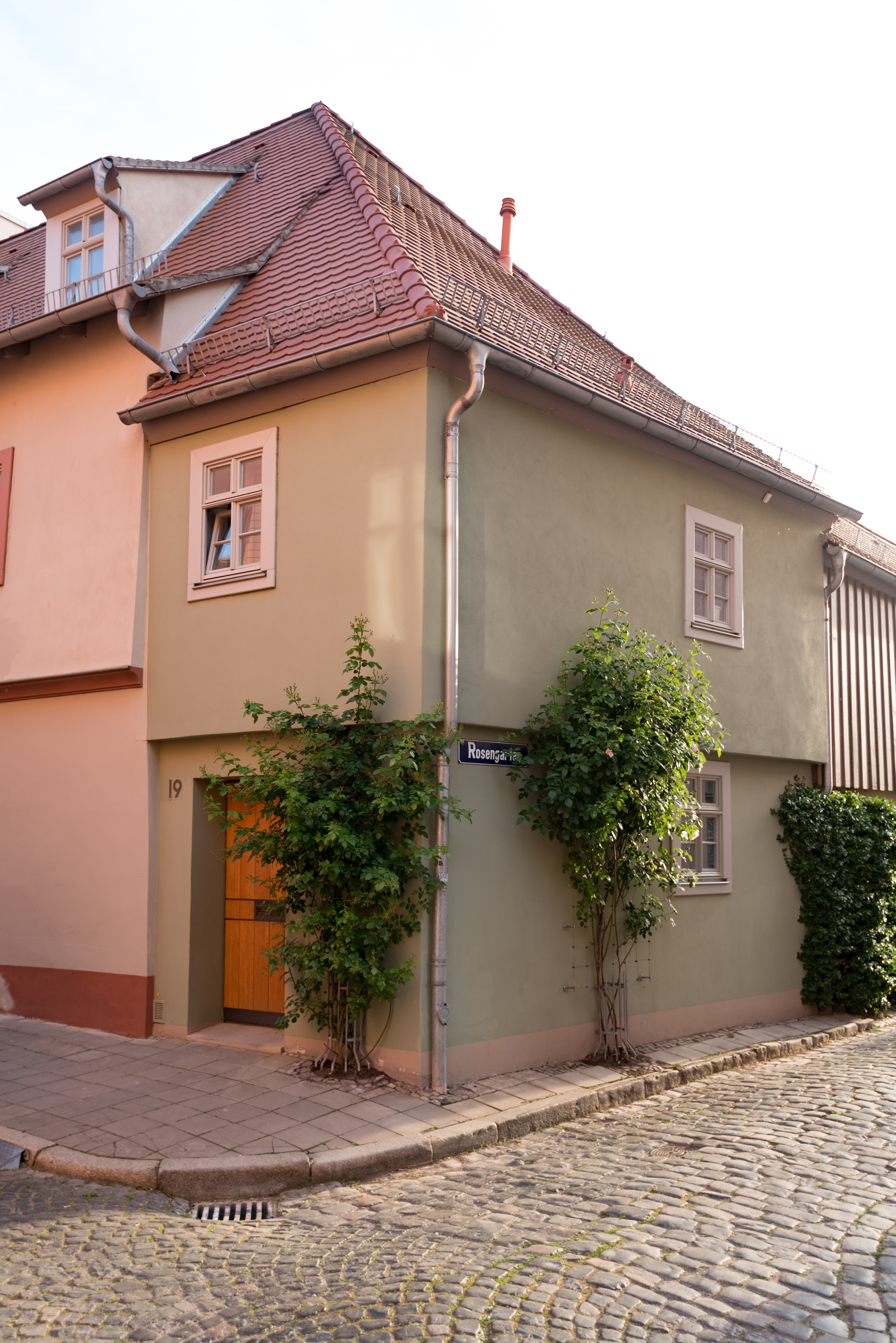 Naumburg (Saale), Mühlgasse 19